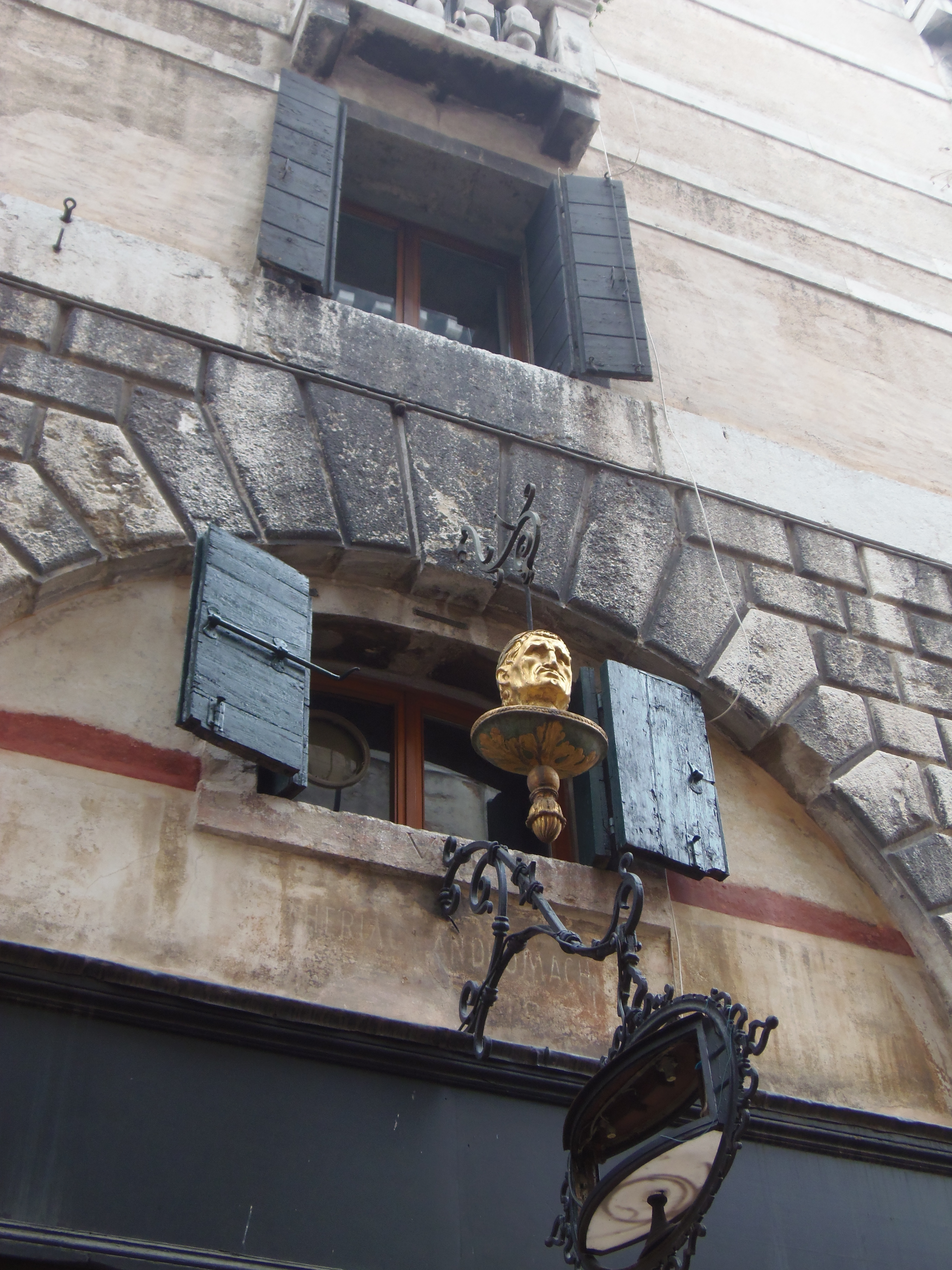 Testa d'Oro, a régi gyógyszertár cégére